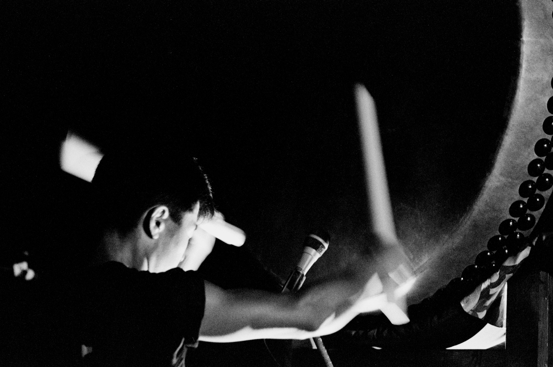 Taiko